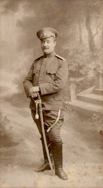 Фото на Михаил Силаги - военна кариера